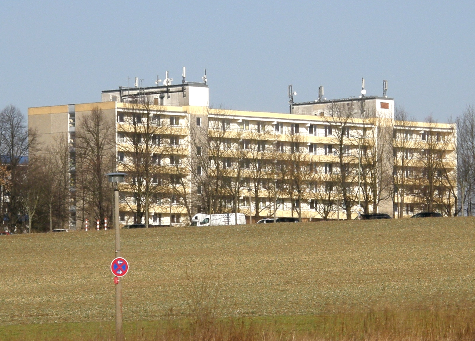 Ansicht von Teilen des Vivantes Klinikums Hellersdorf /Krankenhaus Kaulsdorf: Rettungsstelle